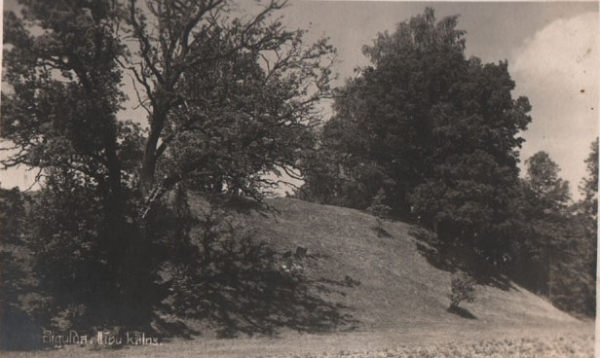 Sattesele linnamägi